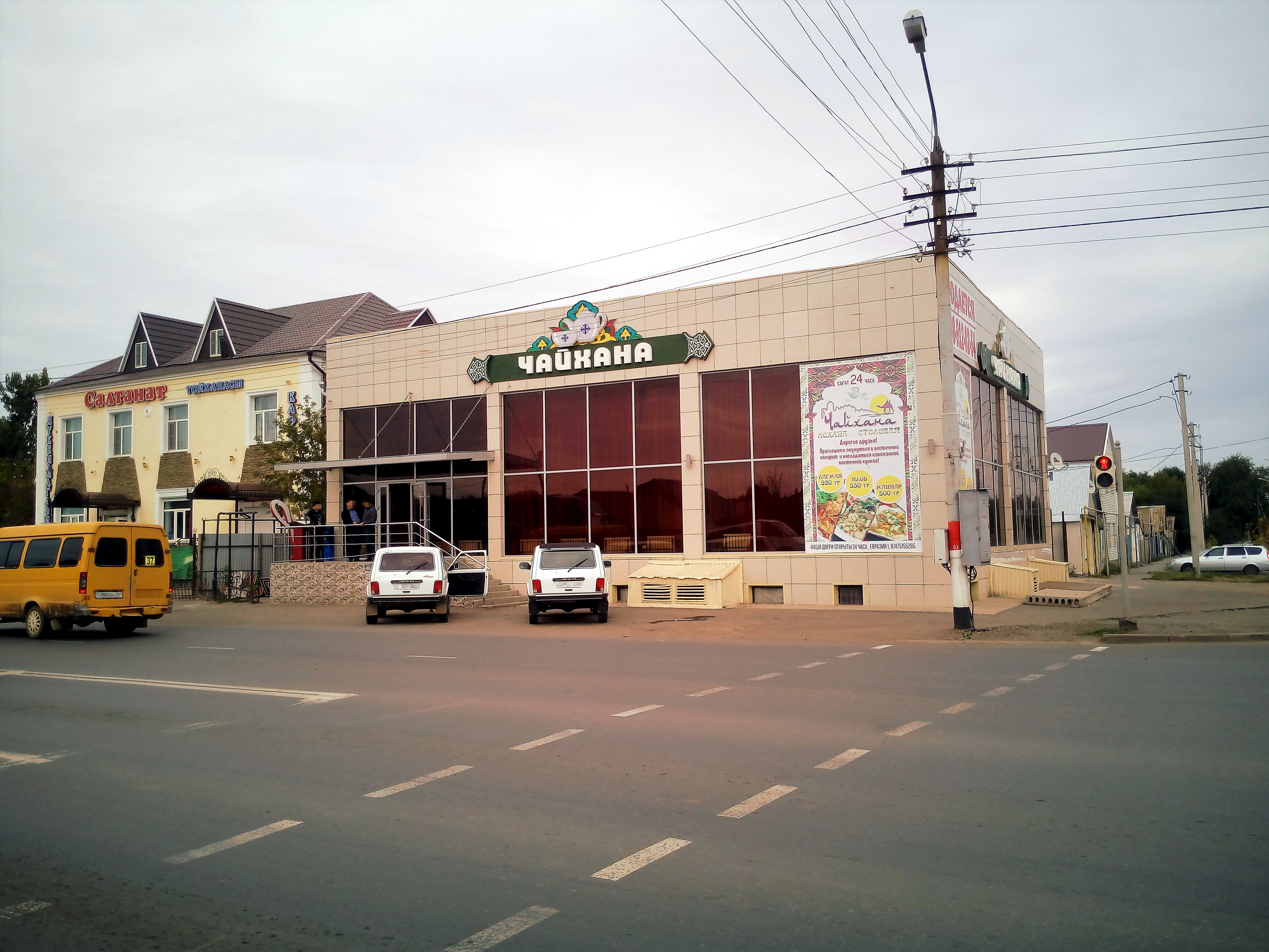 Чайхана